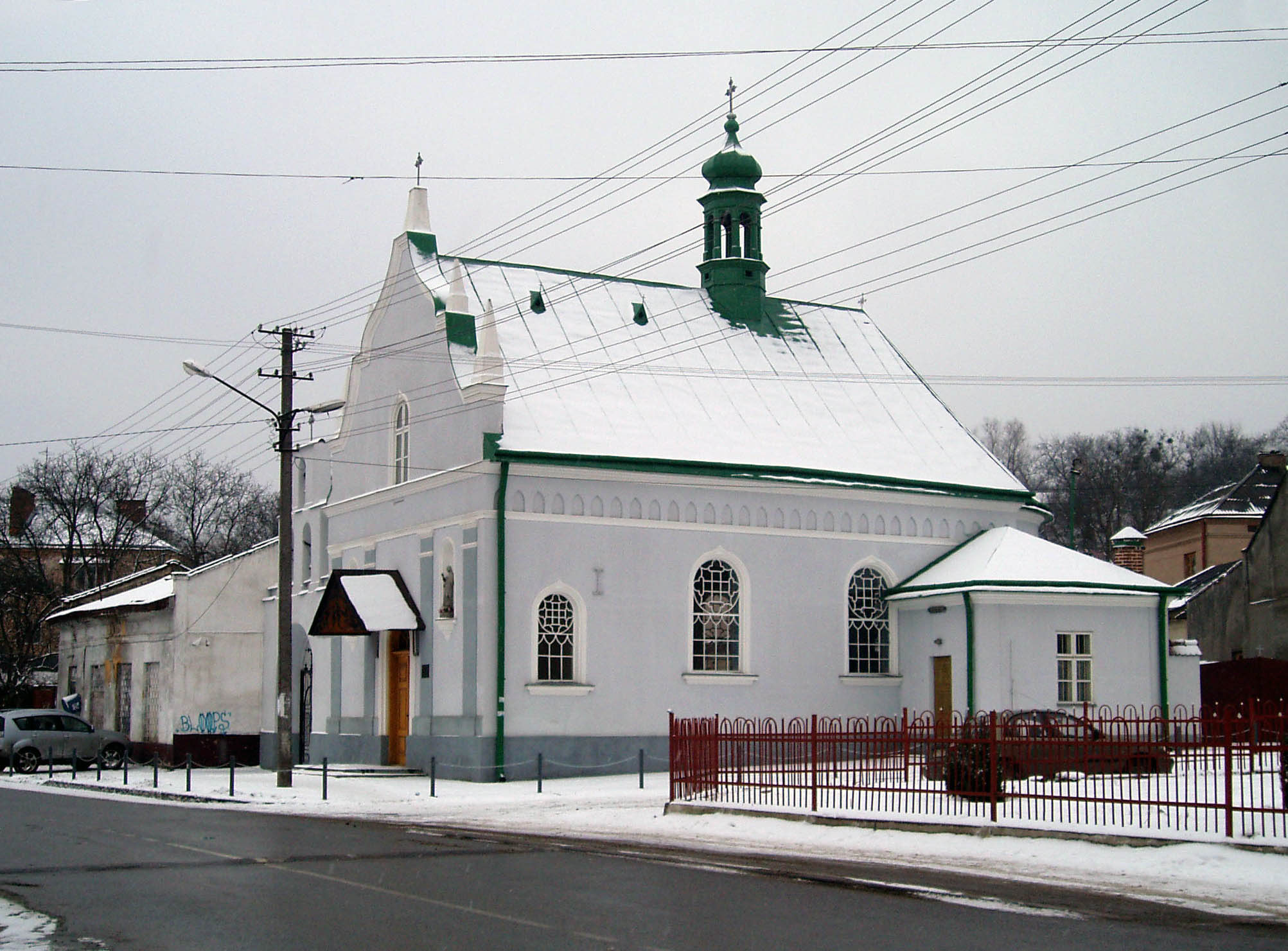 Церква святого Івана Хрестителя у Львові. Колишній костел Матері Божої Вервечкової. Збудований 1904 року, архітектор невідомий.